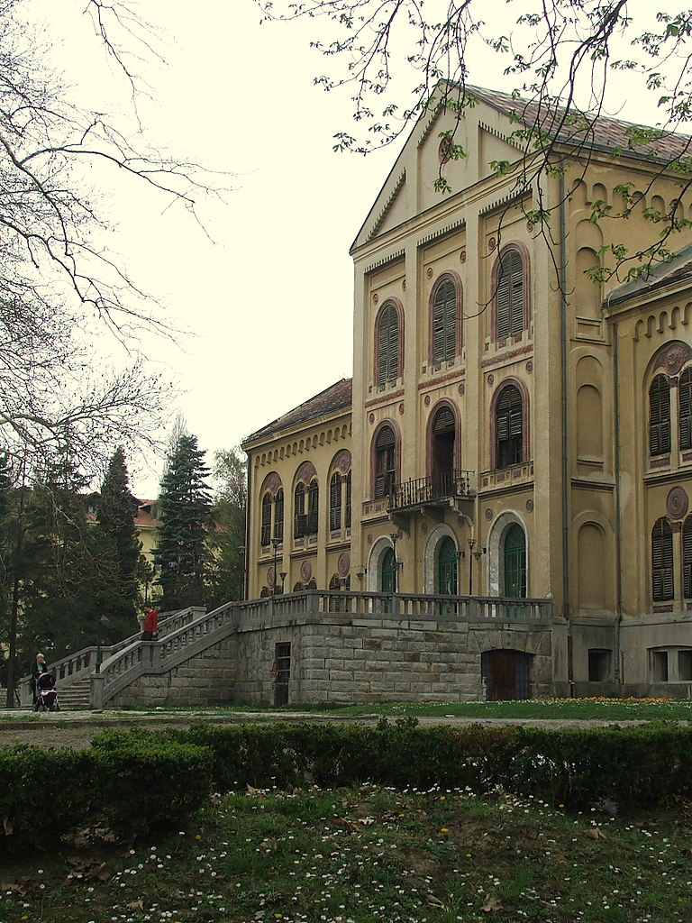 Игор Ирић, , FujiFilm S5500